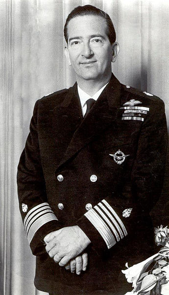 Краљ Петар II Карађорђевић, 1966. година.